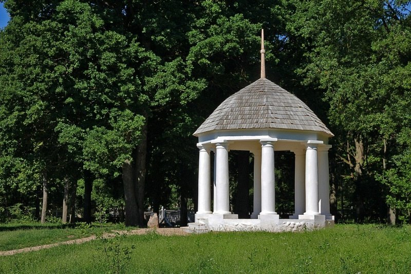 Станькава. Адноўленая альтанка